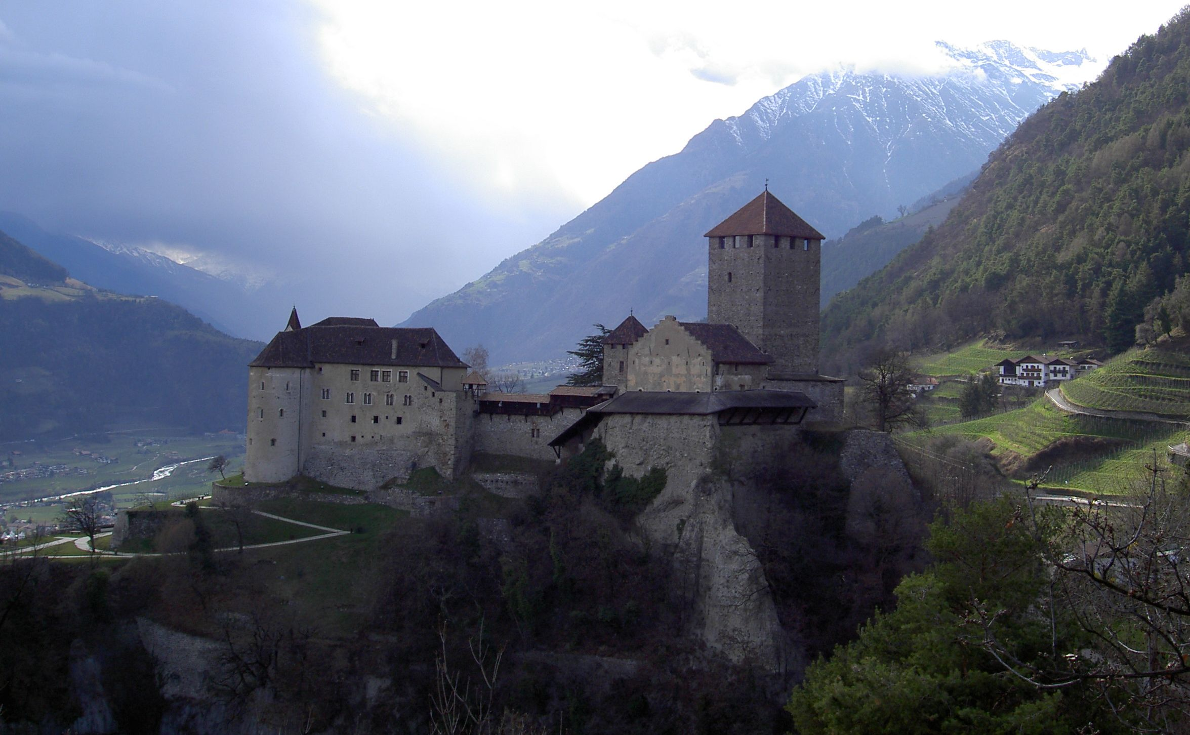 Schloss Tirol im Vordergrund und die nebelbehangene Zielspitze ganz im Hintergrund.